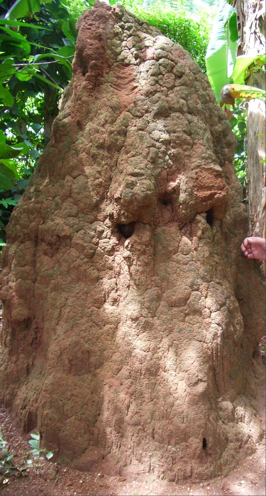 termiter a Sri Lanka; foto feta per J. Ollé el juliol del 2006.